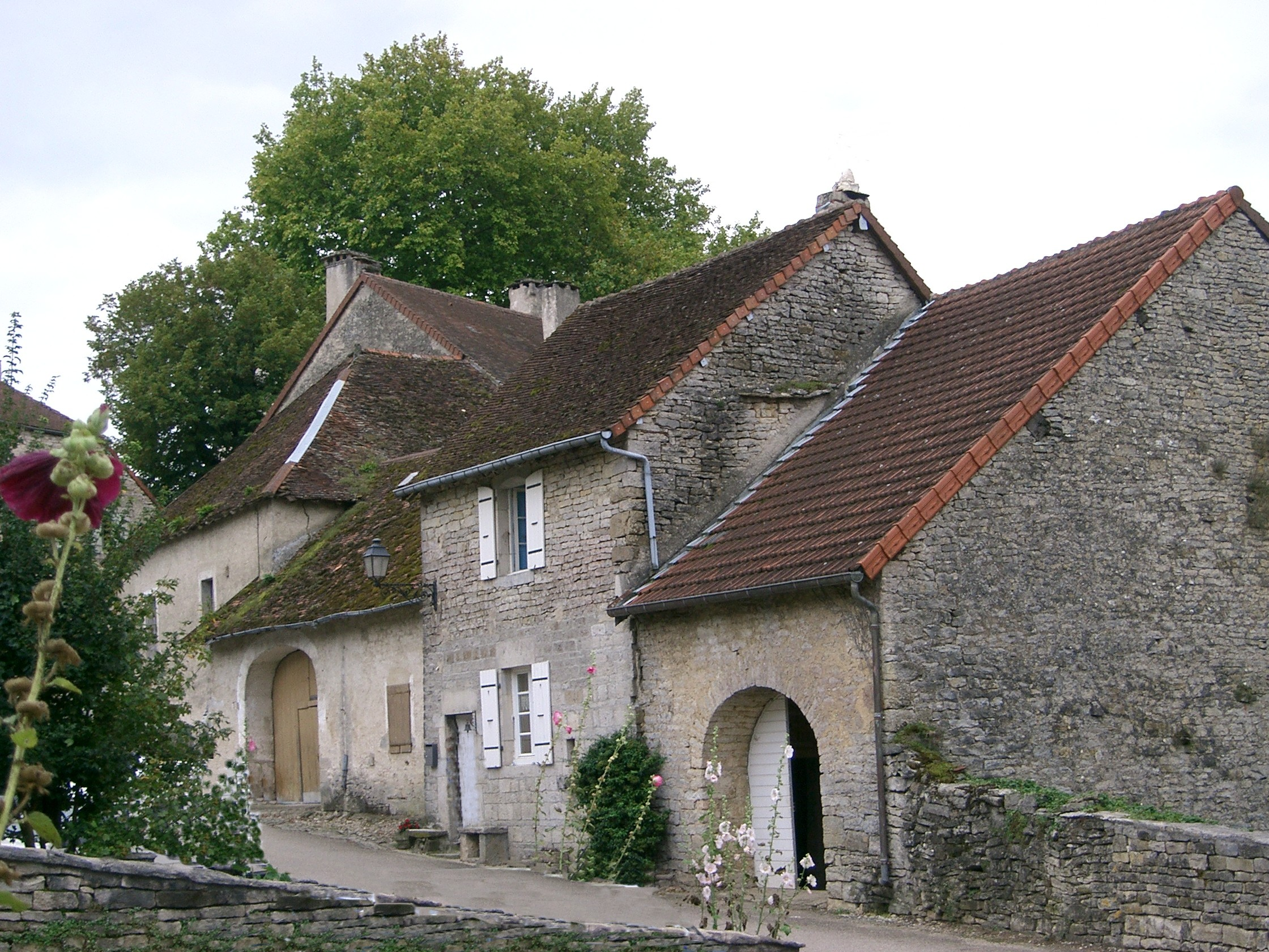 vieilles maisons de Château-Chalon - Jura (39) (France)